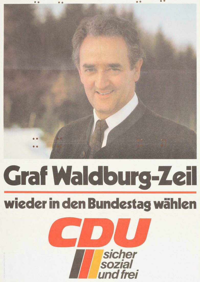 Graf Waldburg-Zeil wieder in den Bundestag wählen CDU sicher sozial und frei Abbildung: Porträtfoto Plakatart: Kandidaten-/Personenplakat mit Porträt Auftraggeber: CDU-Bundesgeschäftsstelle, Abt. Öffentlichkeitsarbeit, Bonn Objekt-Signatur: 10-001: 2659 Bestand: Plakate zu Bundestagswahlen (10-001) GliederungBestand10-18: Plakate zu Bundestagswahlen (10-001) » Die 10. Bundestagswahl am 6. März 1983 » CDU » Mit Porträtfoto Lizenz: KAS/ACDP 10-001: 2659 CC-BY-SA 3.0 DE